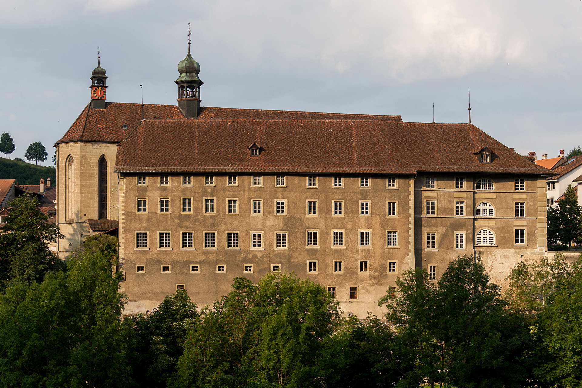 Augustinerkloster in Fribourg